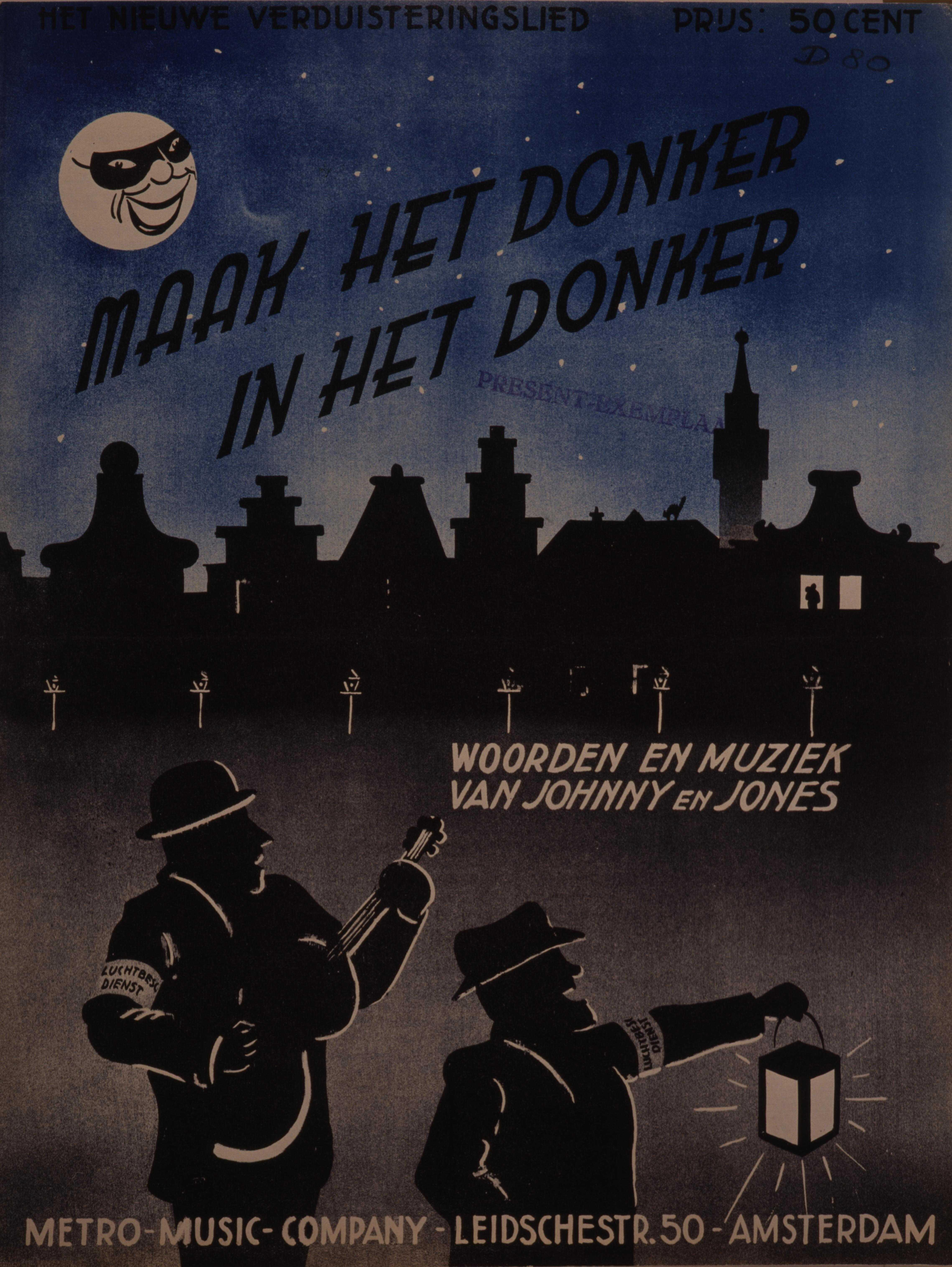 Bladmuziek van een liedje over verduistering door het artiestenduo Johnny en Jones.